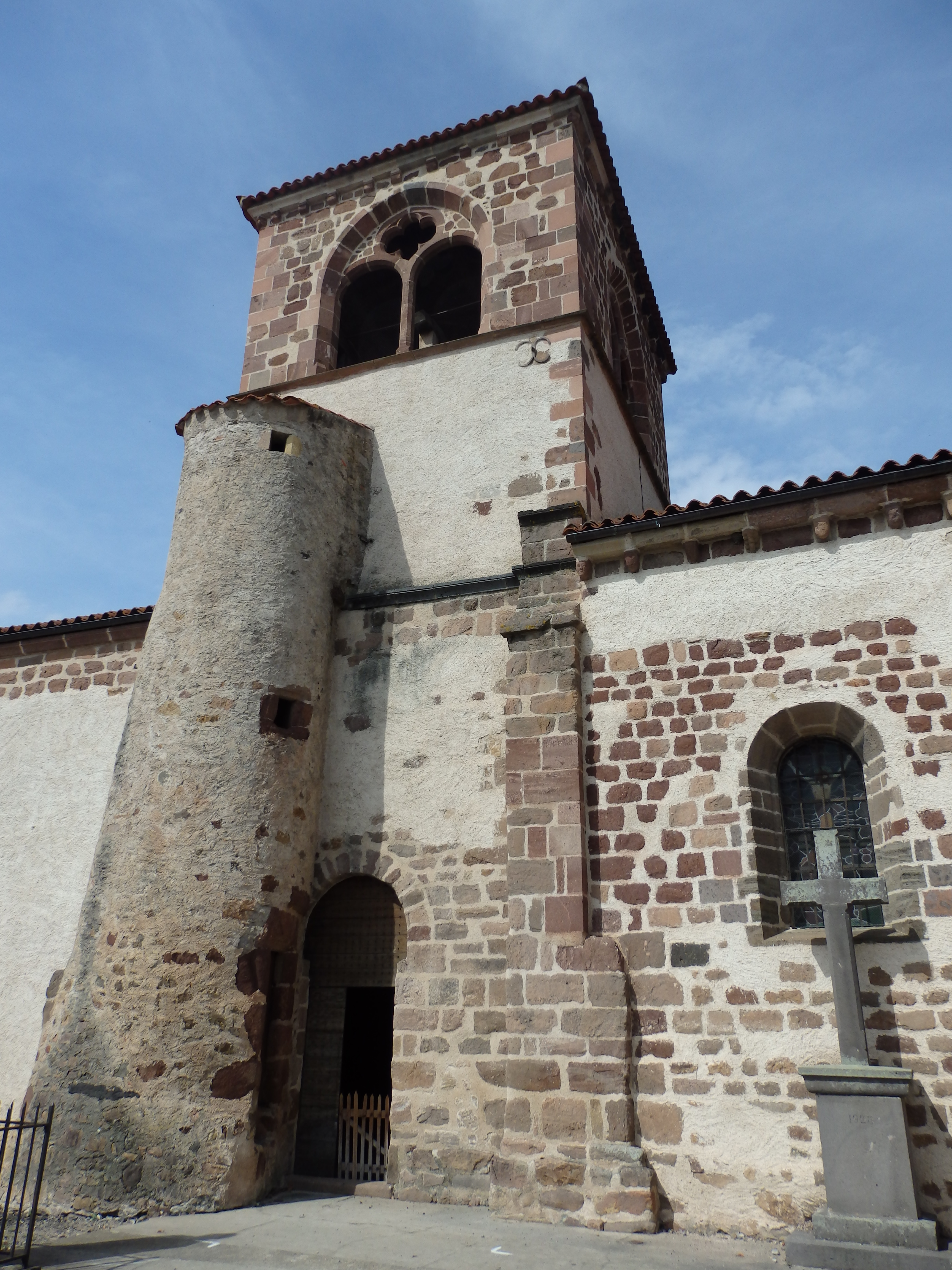 Église Saint-Jean-Baptiste d'Azérat .